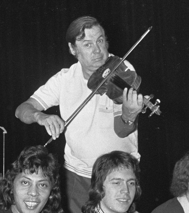 Collectie / Archief : Fotocollectie Anefo Reportage / Serie : [ onbekend ] Beschrijving : Seth Gaaikema repeteert in Carré voor zijn show Elf verdwazingen: Seth Gaaikema en medewerkers Datum : 6 november 1972 Locatie : Amsterdam, Noord-Holland Trefwoorden : shows, theaters Persoonsnaam : Gaaikema, Seth Fotograaf : Peters, Hans / Anefo Auteursrechthebbende : Nationaal Archief Materiaalsoort : Negatief (zwart/wit) Nummer archiefinventaris : bekijk toegang 2.24.01.05 Bestanddeelnummer : 926-0043 Reacties Geplaatst door Maaike op 19 januari 2014 - 16:31. Persoonsnamen: Riem de Wolff, Ruud de Wolff, Frans Drabe, Jan Ypema, Henk van Dijk, Frans Rettich